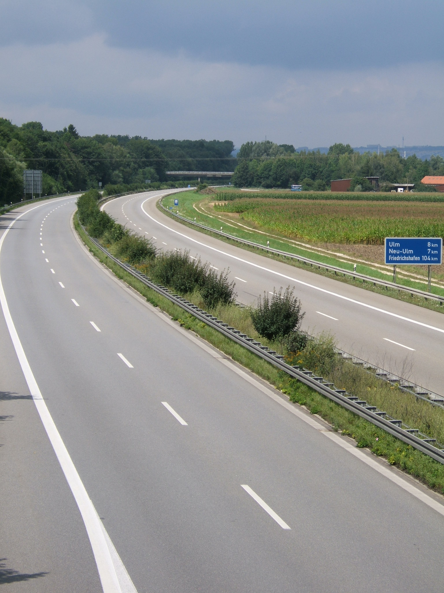 Bundesstraße 28 between Hittistetten and Ulm, near Senden (Bavaria).